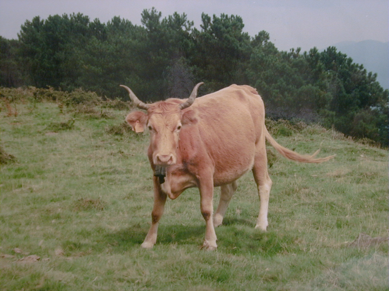 Betizu bat Adarra mendian.